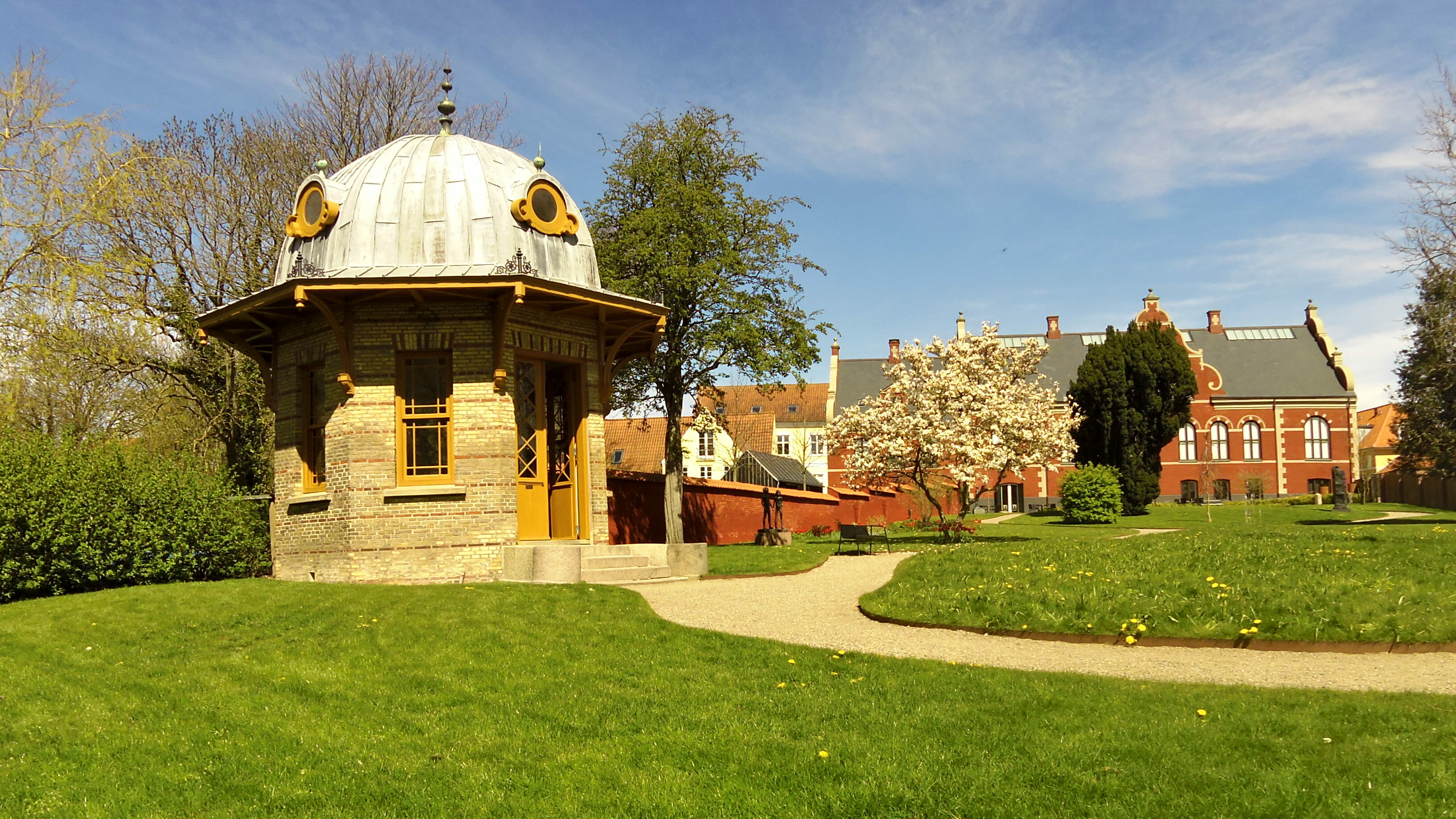 Kunstmuseets have